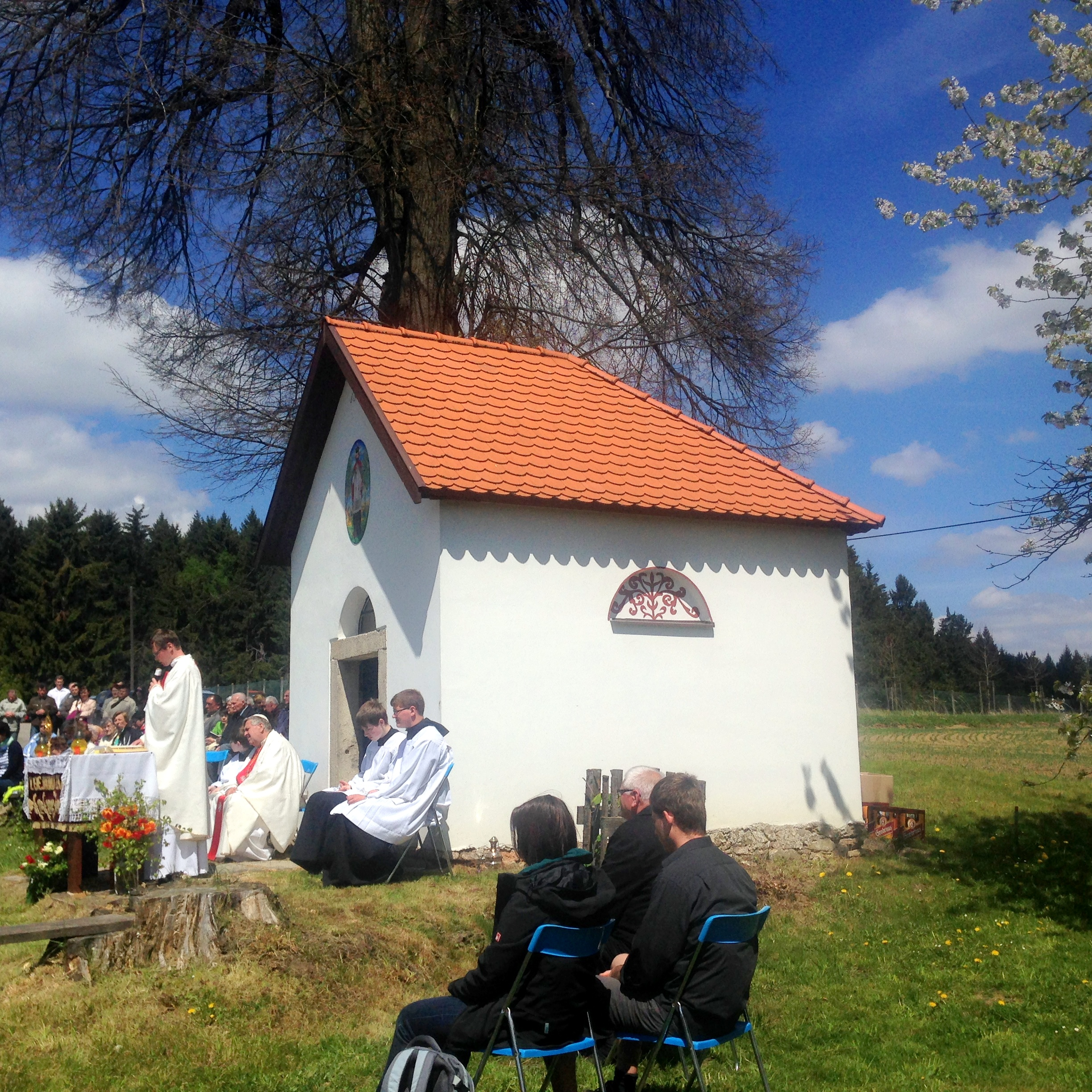 Mše Nepomuky 1